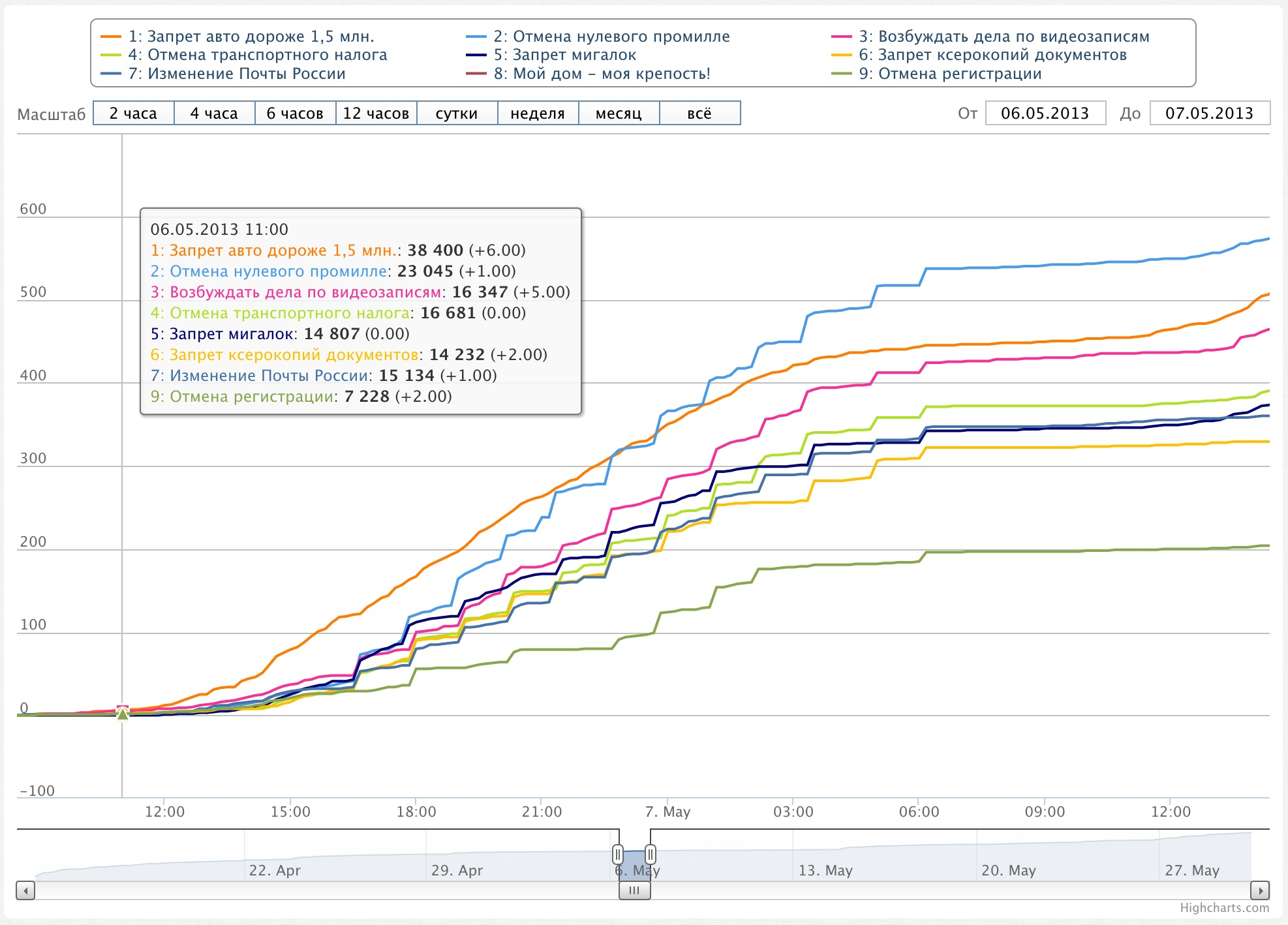 Статистические аномалии при голосовании на сайте «Российская общественная инициатива»